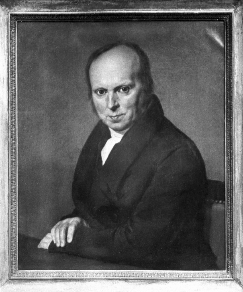 Friedrich Gottlob Haug (* 5. Oktober 1769; † 10. Januar 1850), Professor an der Hochschule Stuttgart, um 1820